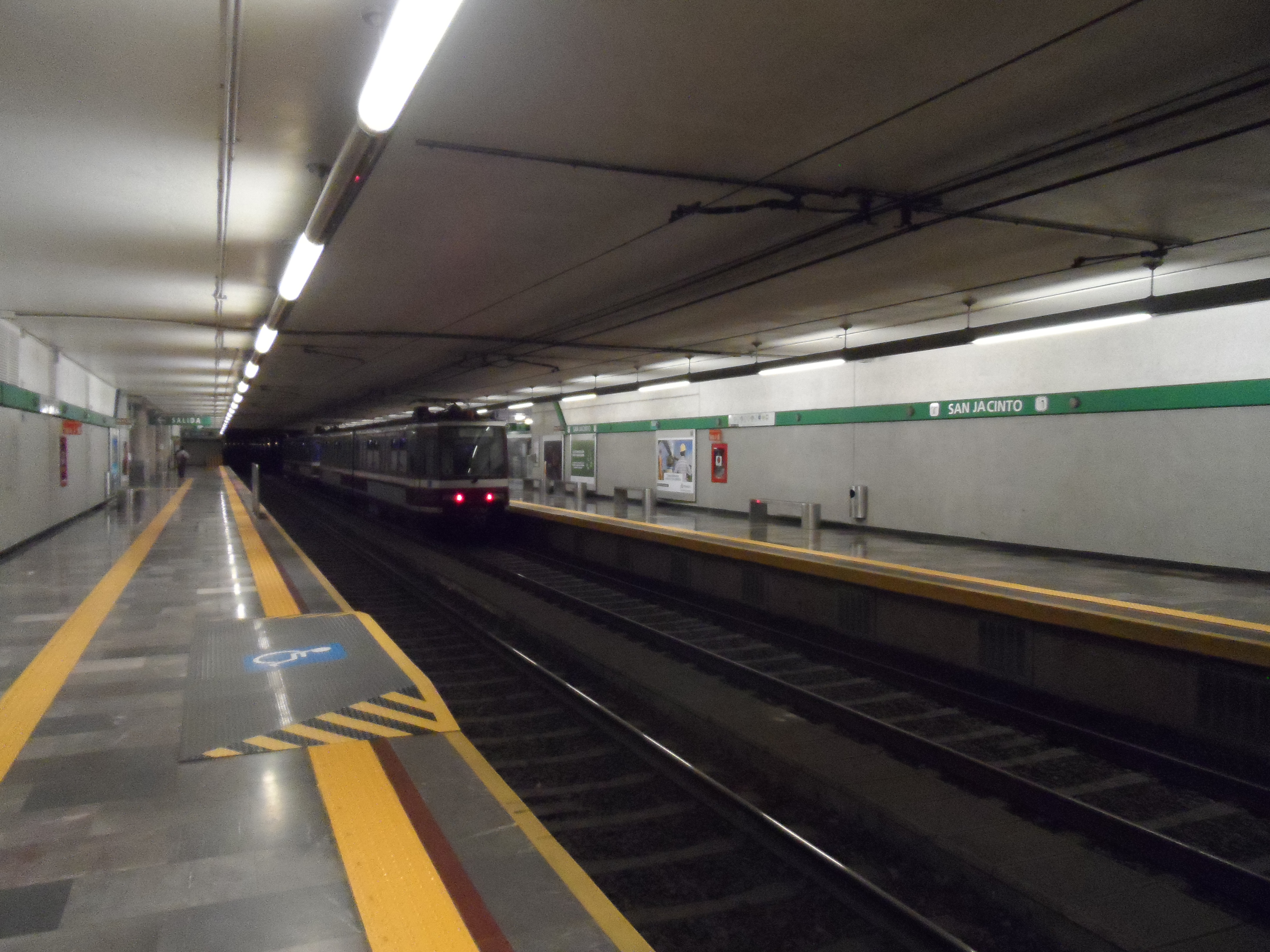 La estación "San Jacinto" de la Línea 2 del Tren Ligero de Guadalajara, al fondo se ve un tren TLG-88 estacionado.